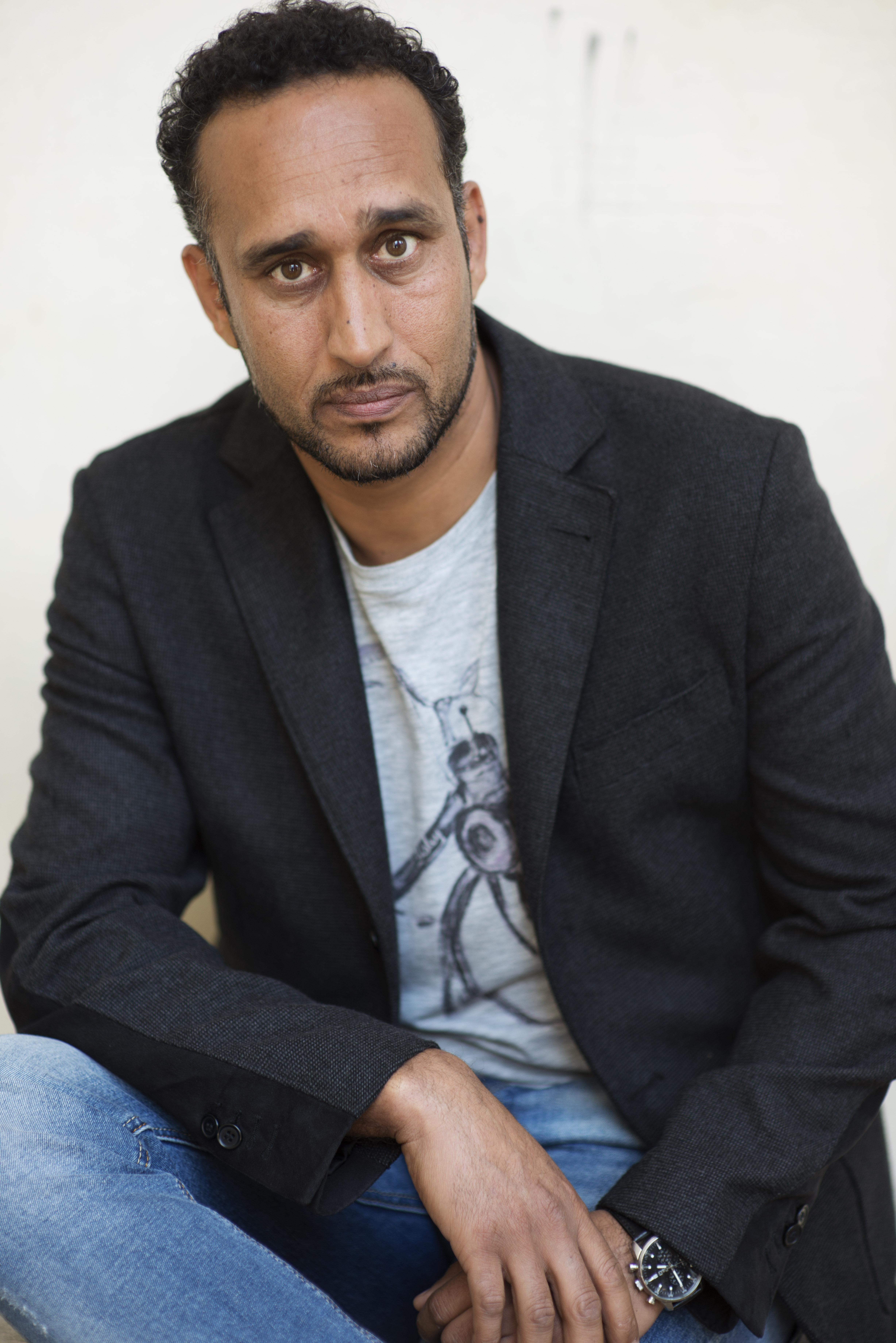 Foto dell'attore e regista Hedy Krissane